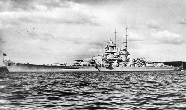 Schlachtschiff "Gneisenau" Schlachtschiff "Gneisenau"